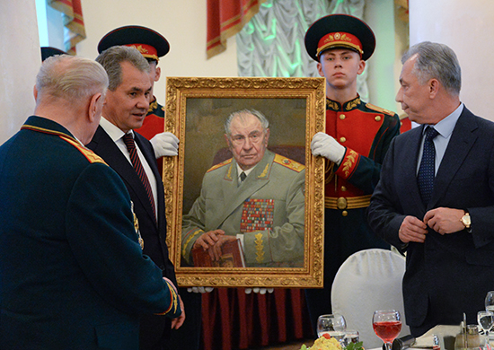 Министр обороны РФ генерал армии Сергей Шойгу поздравляет маршала СССР Дмитрия Тимофеевича Язова с 90-летним юбилеем